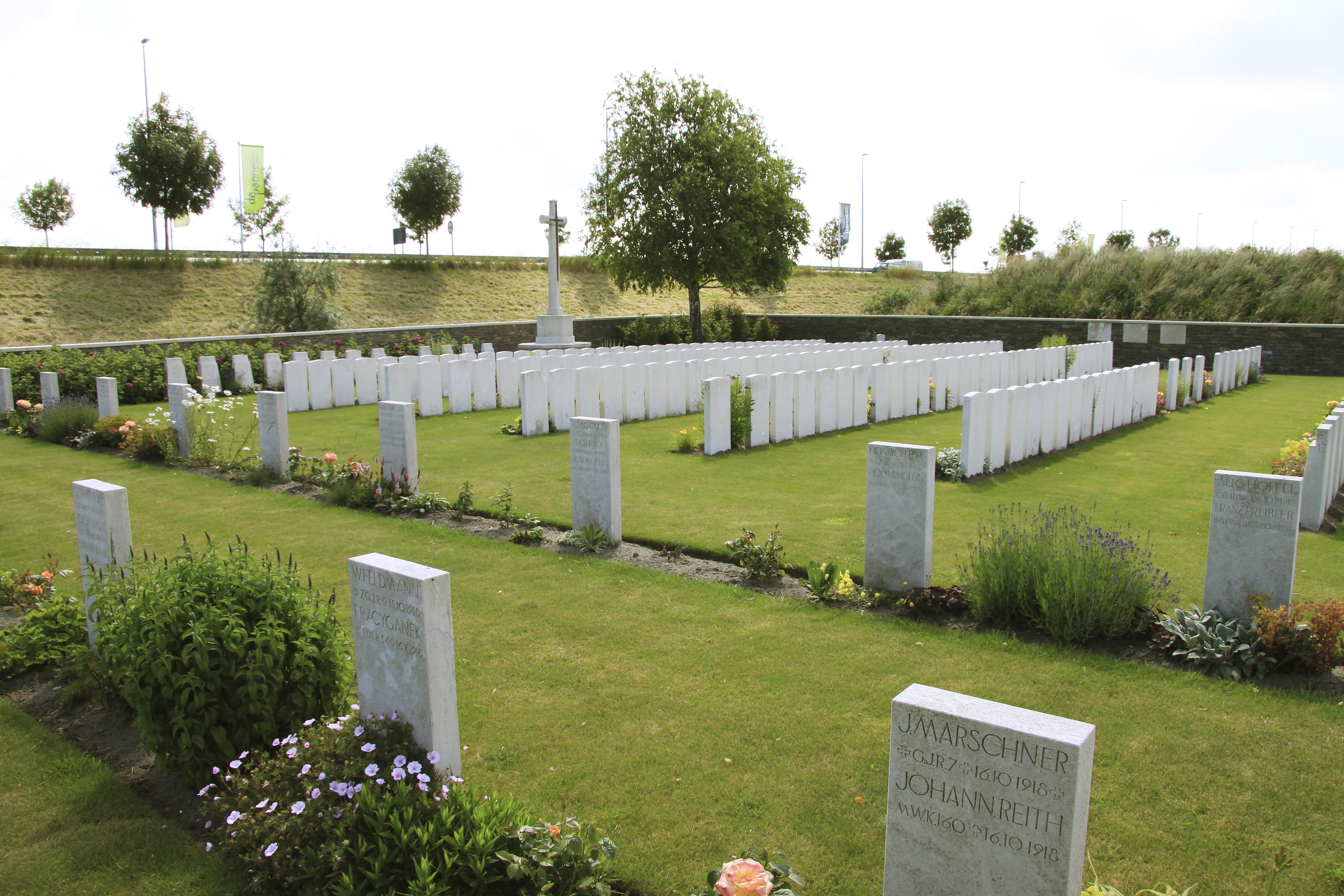 Adinkerke Military Cemetery. Overzicht